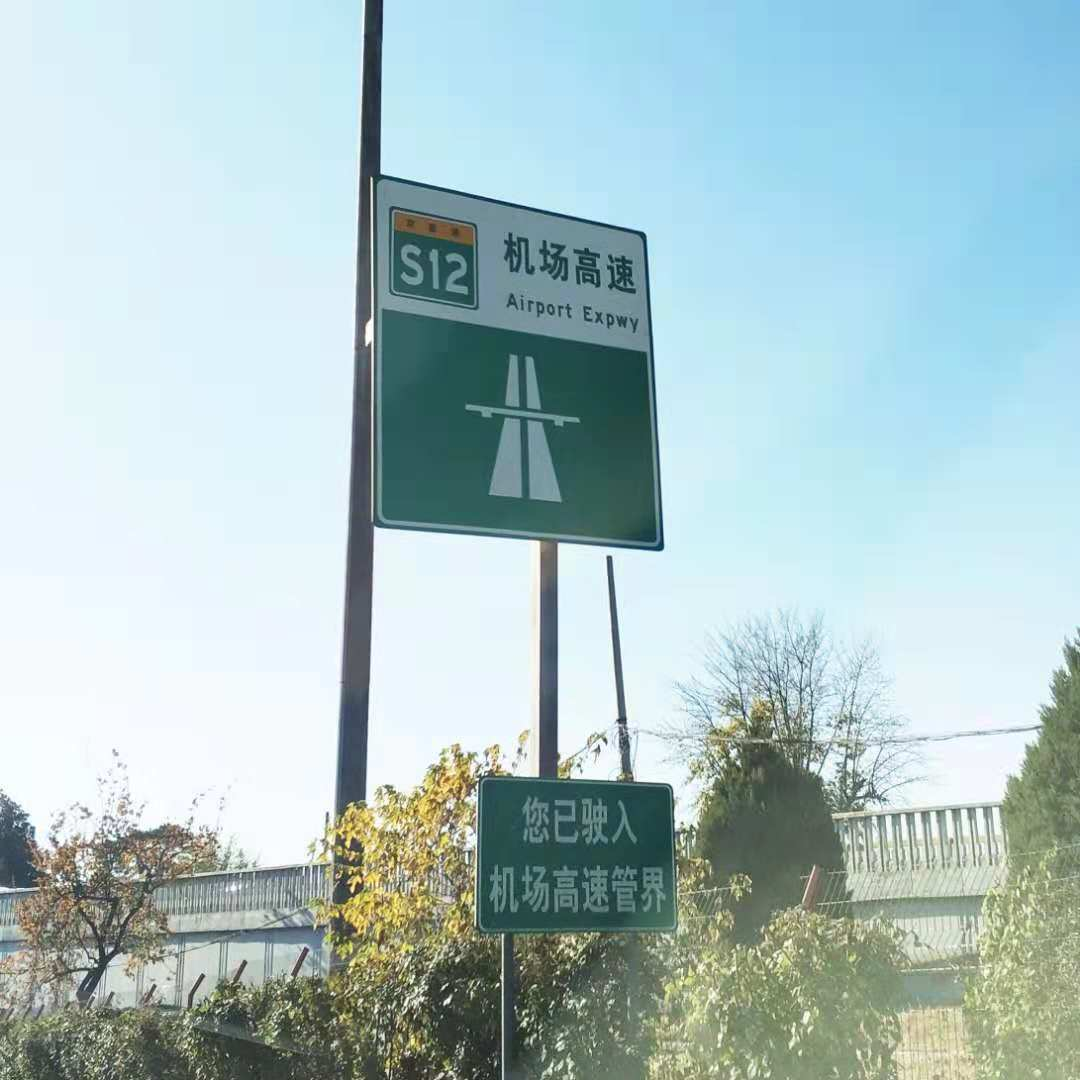 北京首都机场高速起点